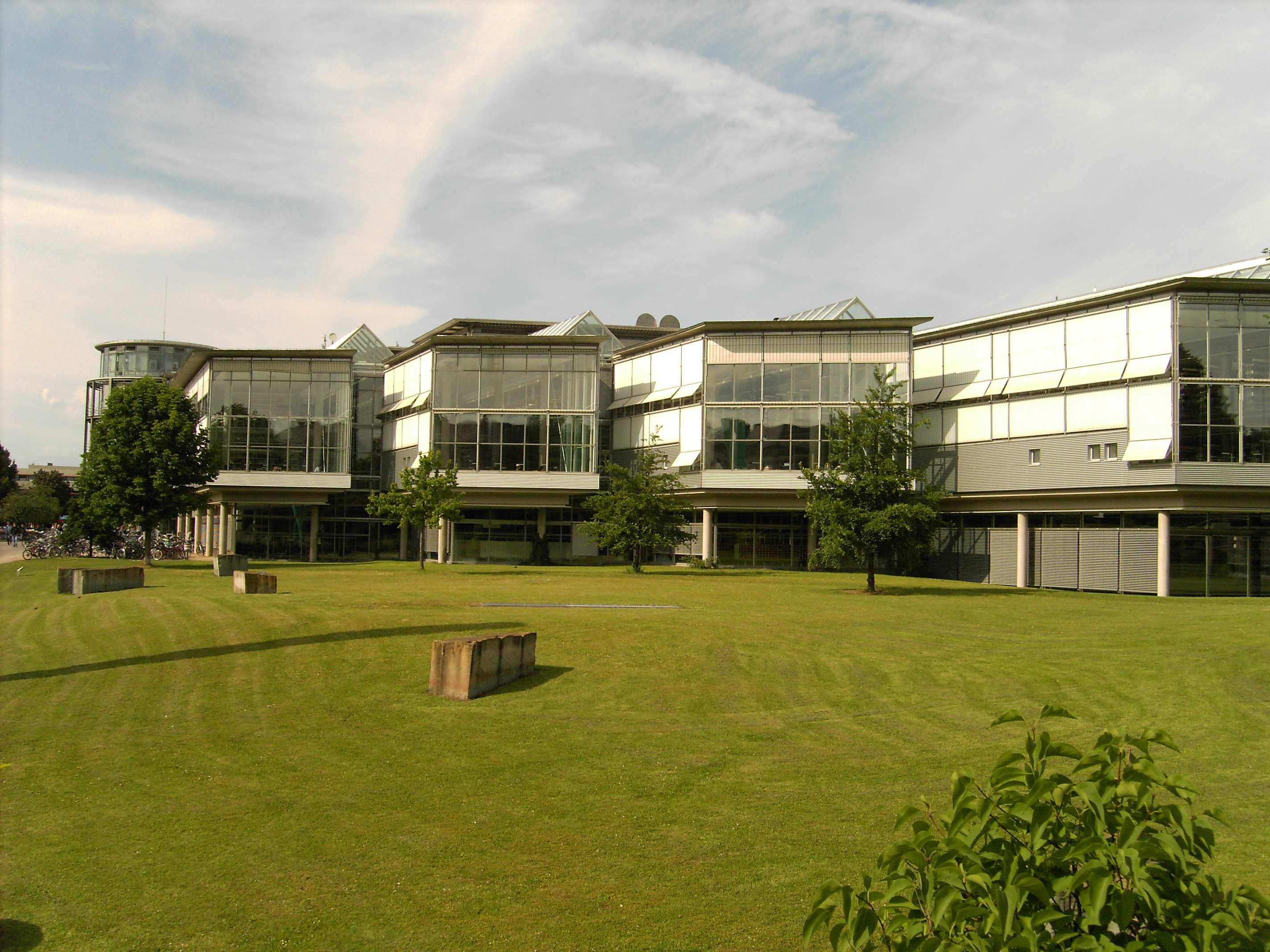 Göttingen, Platz der Göttinger Sieben, University Library, SUB